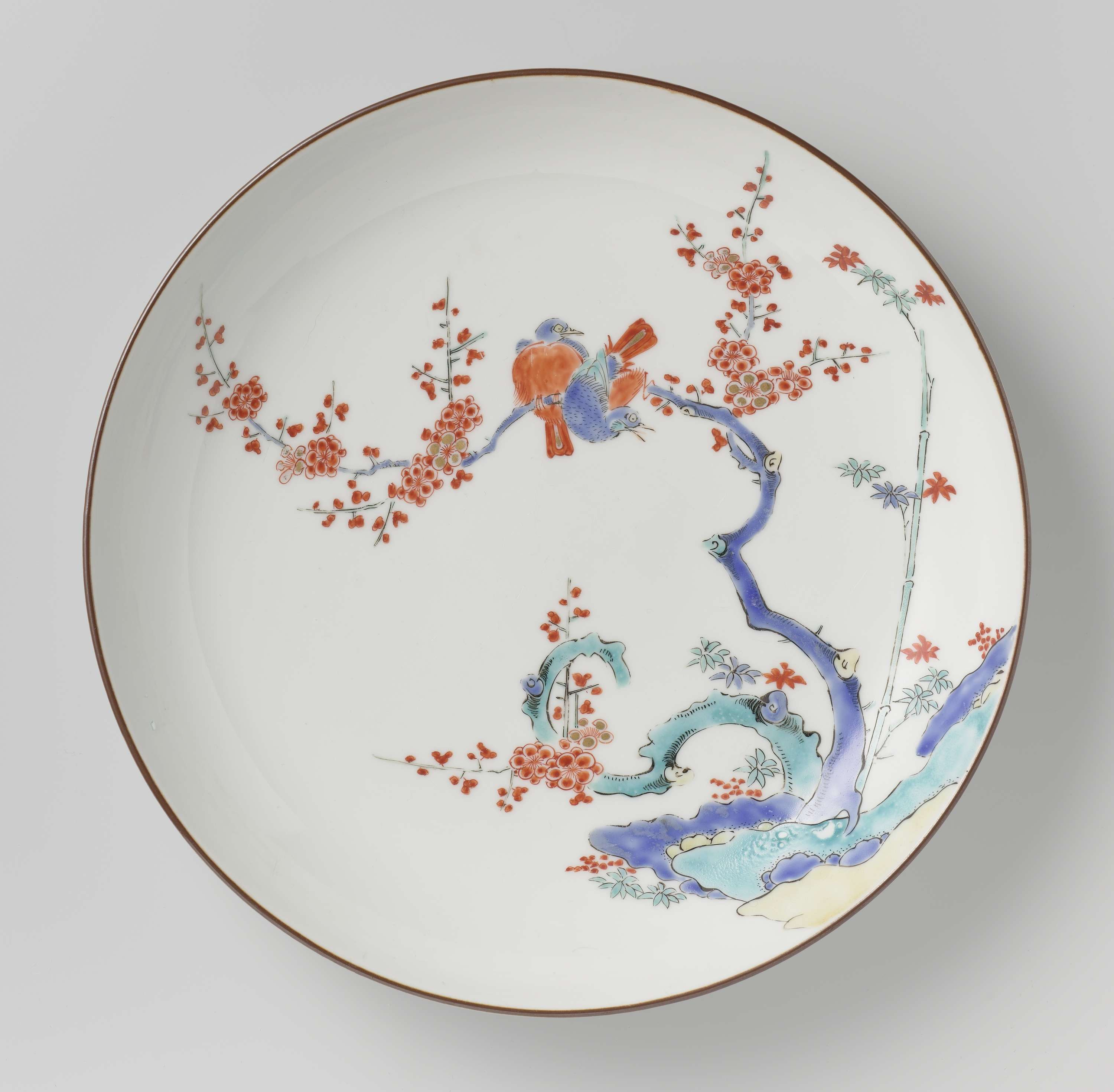 Bord van porselein, beschilderd op het glazuur in blauw, rood, groen, geel, zwart en goud met rotsen, bamboetak en prunus met twee vogels op een prunustak. Bruine rand. Zes proenen in de voetring. Kakiemon stijl.; plate (dishes)